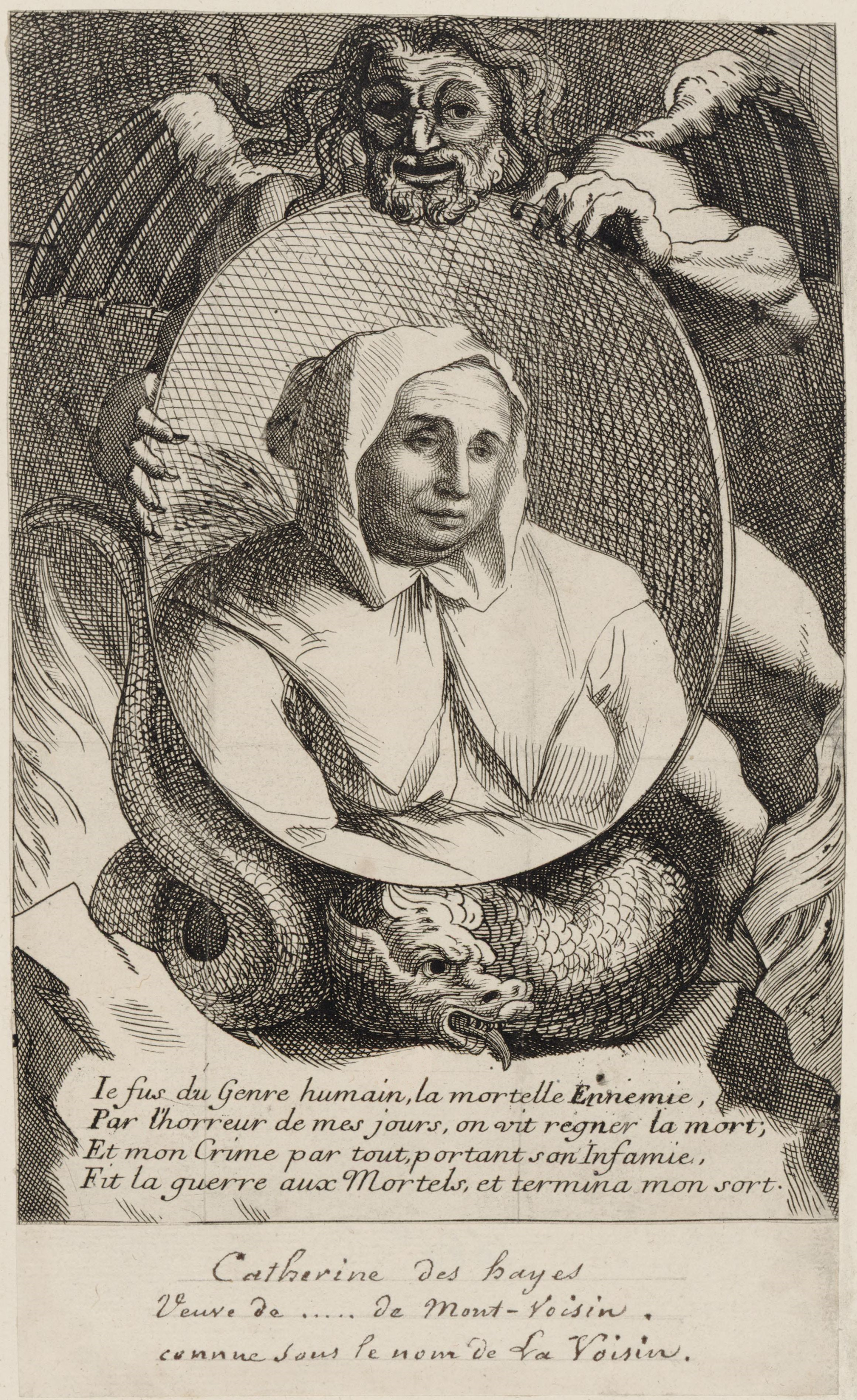 Catherine Deshayes, veuve Montvoisin, dite La Voisin Illustration du Mercure galant fevrier 1680, BnF, Hennin 5051.